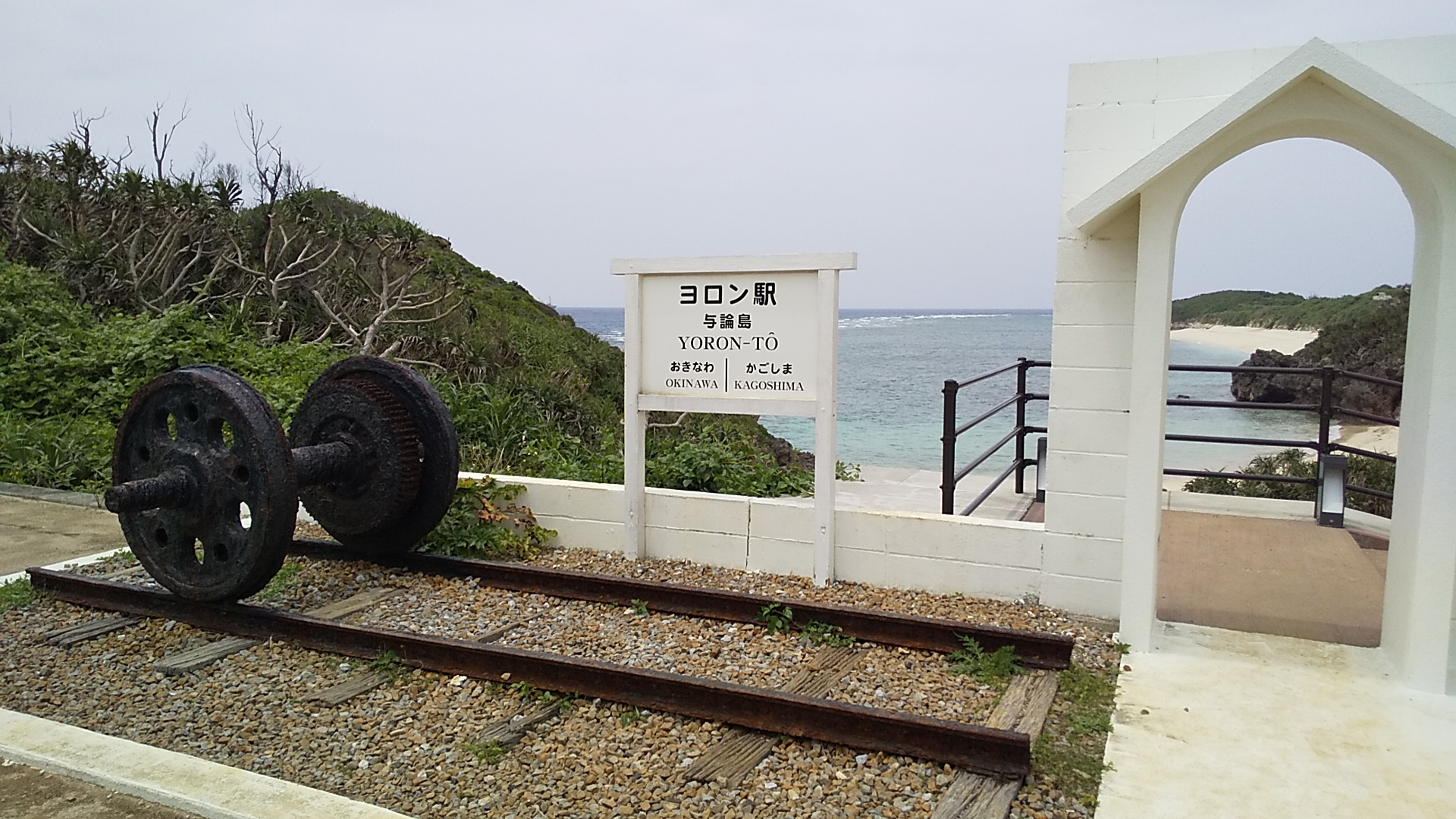 2019年5月撮影